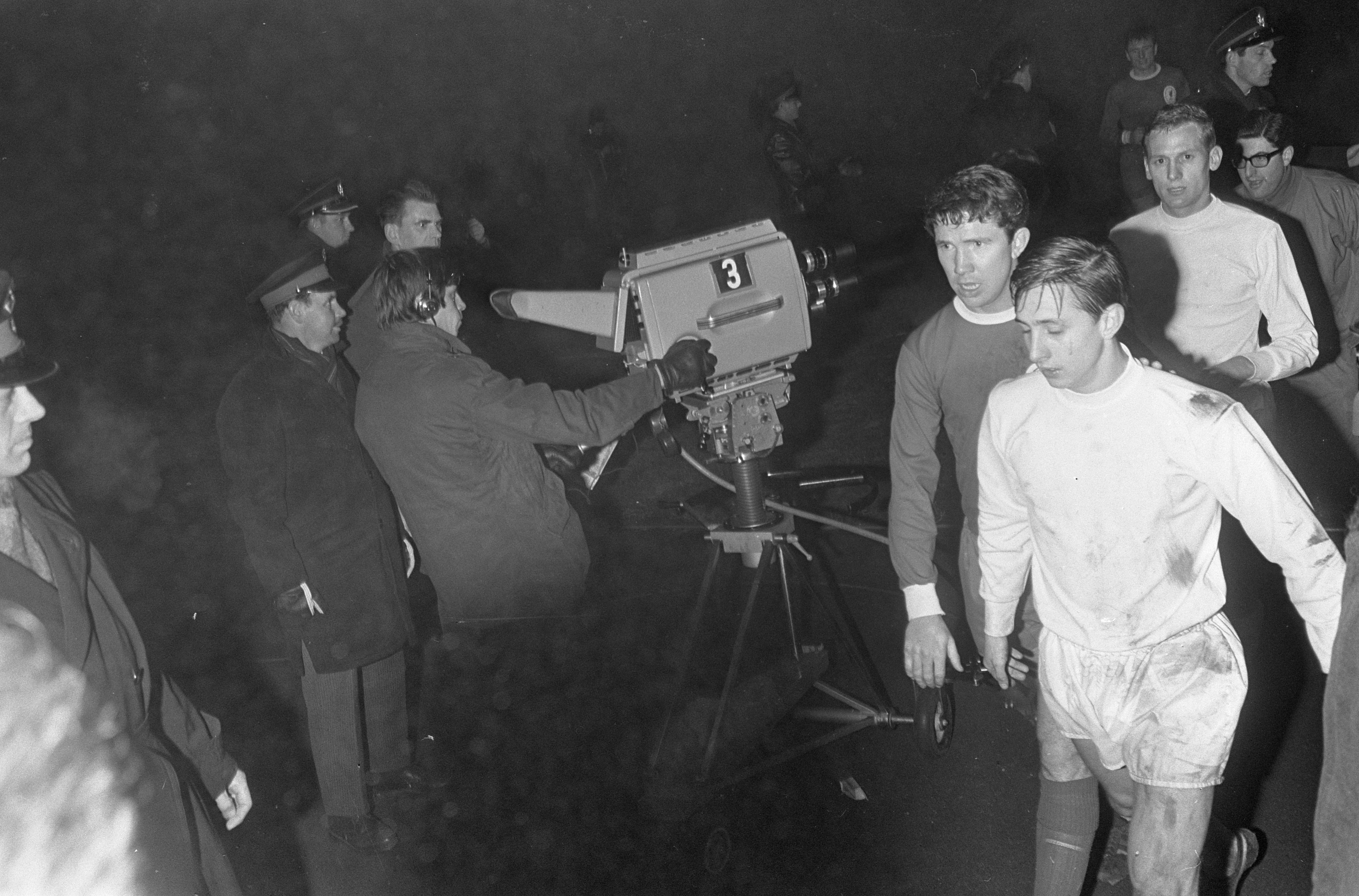 Collectie / Archief : Fotocollectie Anefo Reportage / Serie : [ onbekend ] Beschrijving : Europacup I. Ajax tegen Liverpool 5-1, Cruijff (met links Yeats) en Nuninga gaan naar de kleedkamer. Links een televisiecamera Annotatie : Befaamde ´Mistwedstrijd´ Datum : 7 december 1966 Locatie : Amsterdam Trefwoorden : camera's, sport, voetbal, voetballers Persoonsnaam : Cruijff, Johan, Nuninga, Klaas Fotograaf : Koch, Eric / Anefo Auteursrechthebbende : Nationaal Archief Materiaalsoort : Negatief (zwart/wit) Nummer archiefinventaris : bekijk toegang 2.24.01.05 Bestanddeelnummer : 919-8572